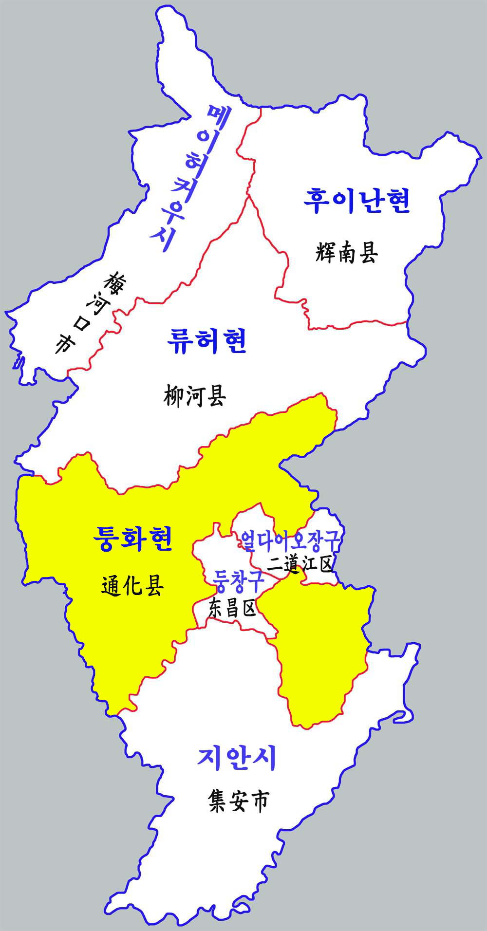 퉁화시 현급구역